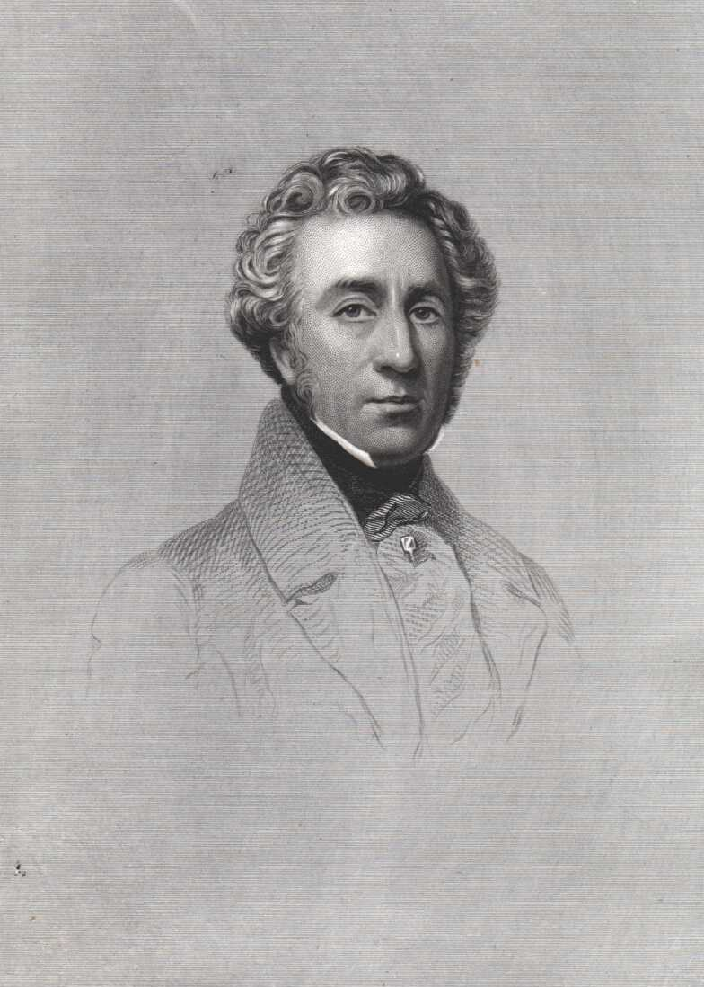 Scientist: Napier, Robert (1791 - 1876) Discipline(s): Engineering Print Artist: William G. Jackman Medium: Engraving Original Dimensions: Graphic: 10 x 8 cm / Sheet: 25.3 x 15.7 cm